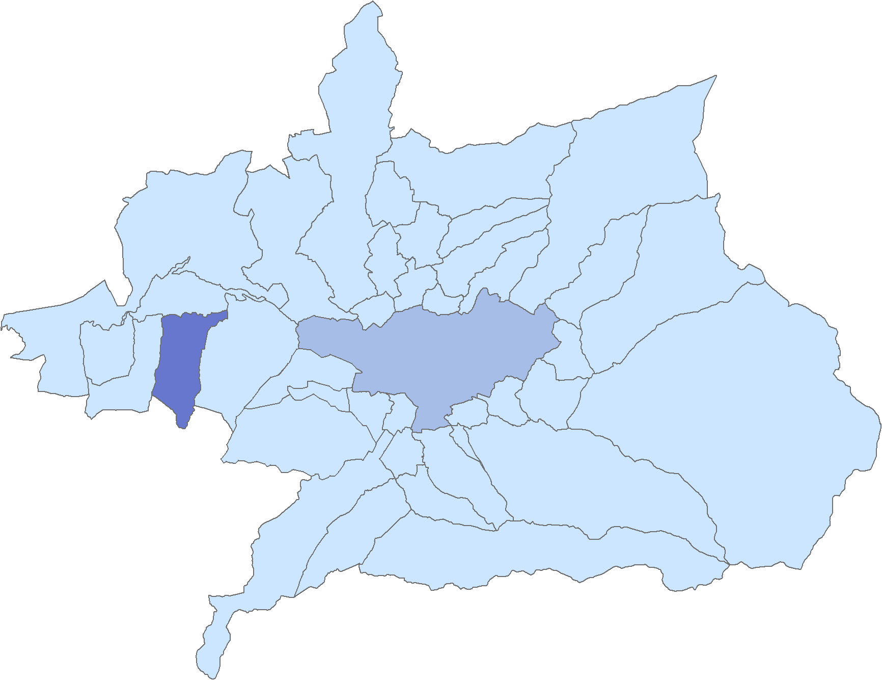 Situación del municipio de Chauchina respecto a la comarca de la Vega de Granada, en España.